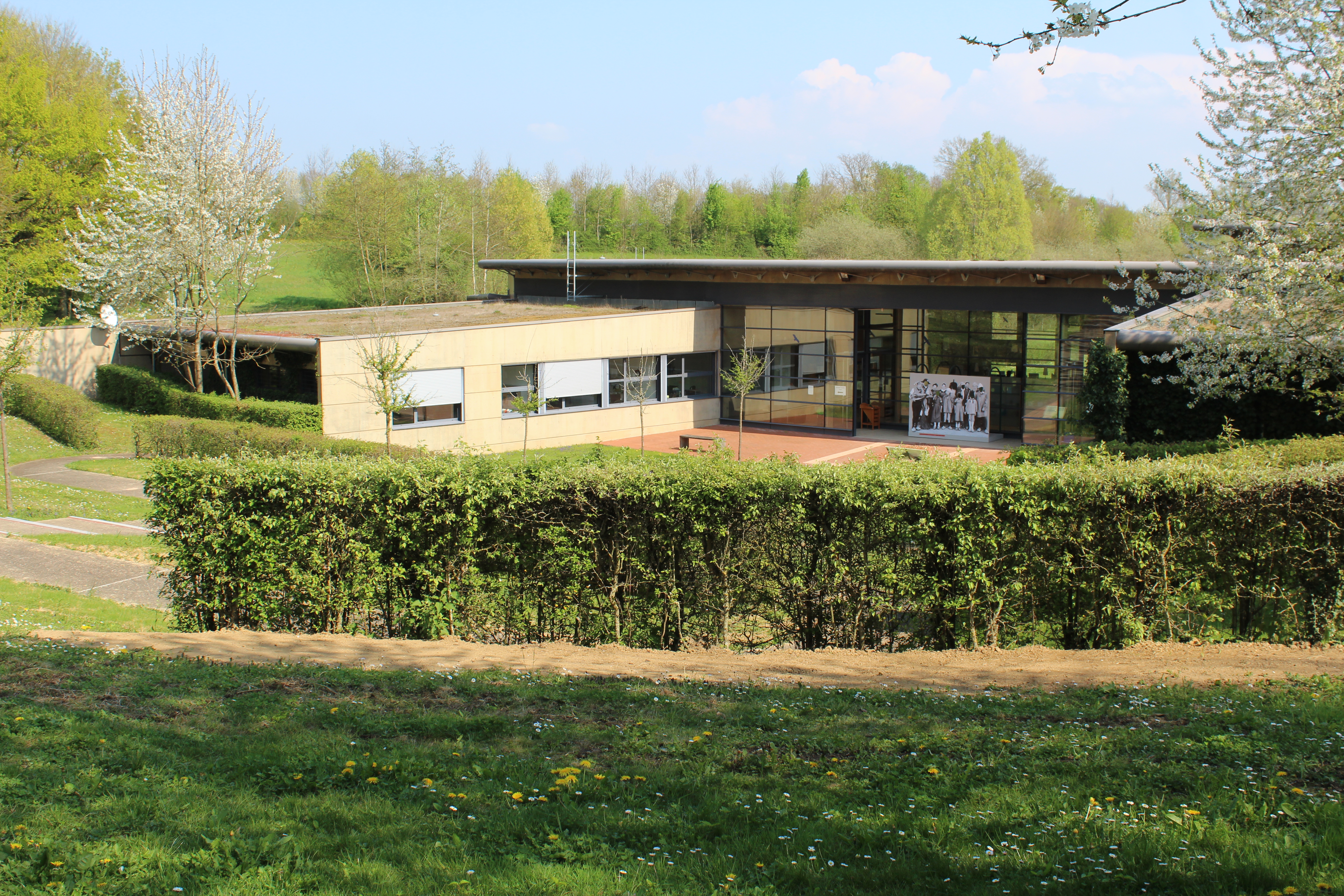 Bâtiment d'accueil du musée départemental de la Bresse, Saint-Cyr-sur-Menthon.